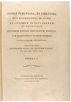 Flora Peruviana ete Chilensis title page